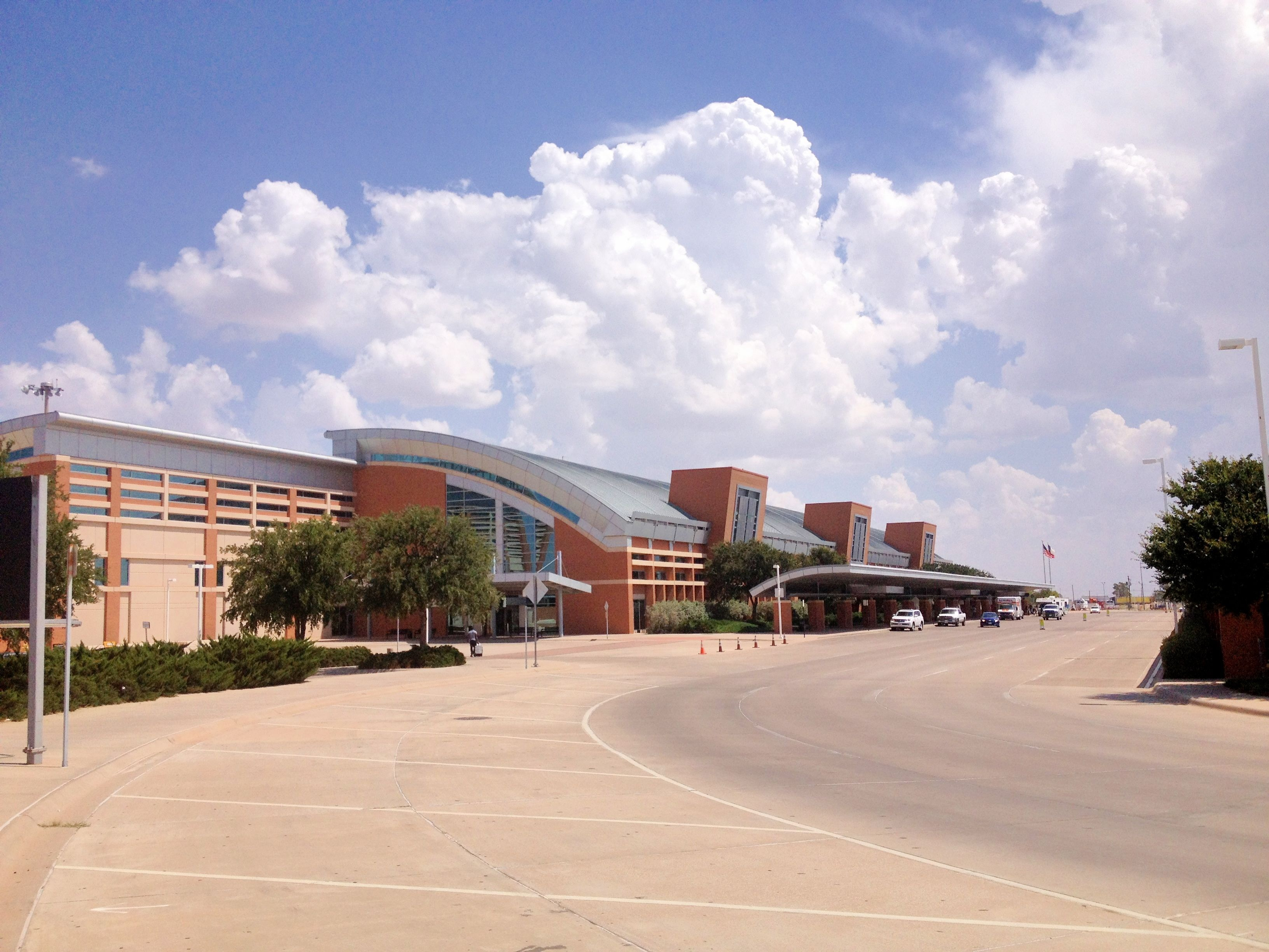 MAA Terminal August 2013